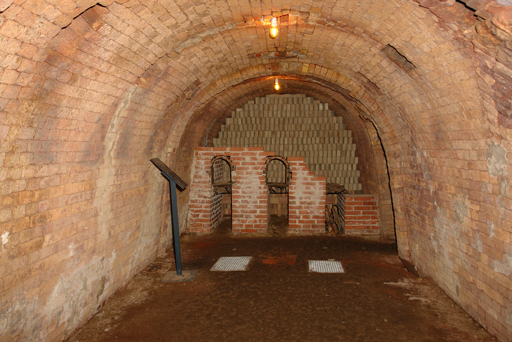 Cathrinesminde Teglvaerk an der Flensburger Förde. Als Ziegelei gegründet 1732, stillgelegt 1968. 1986 bis 1993 restauriert, heute Ziegeleimuseum. Brennkammer im Ringofen